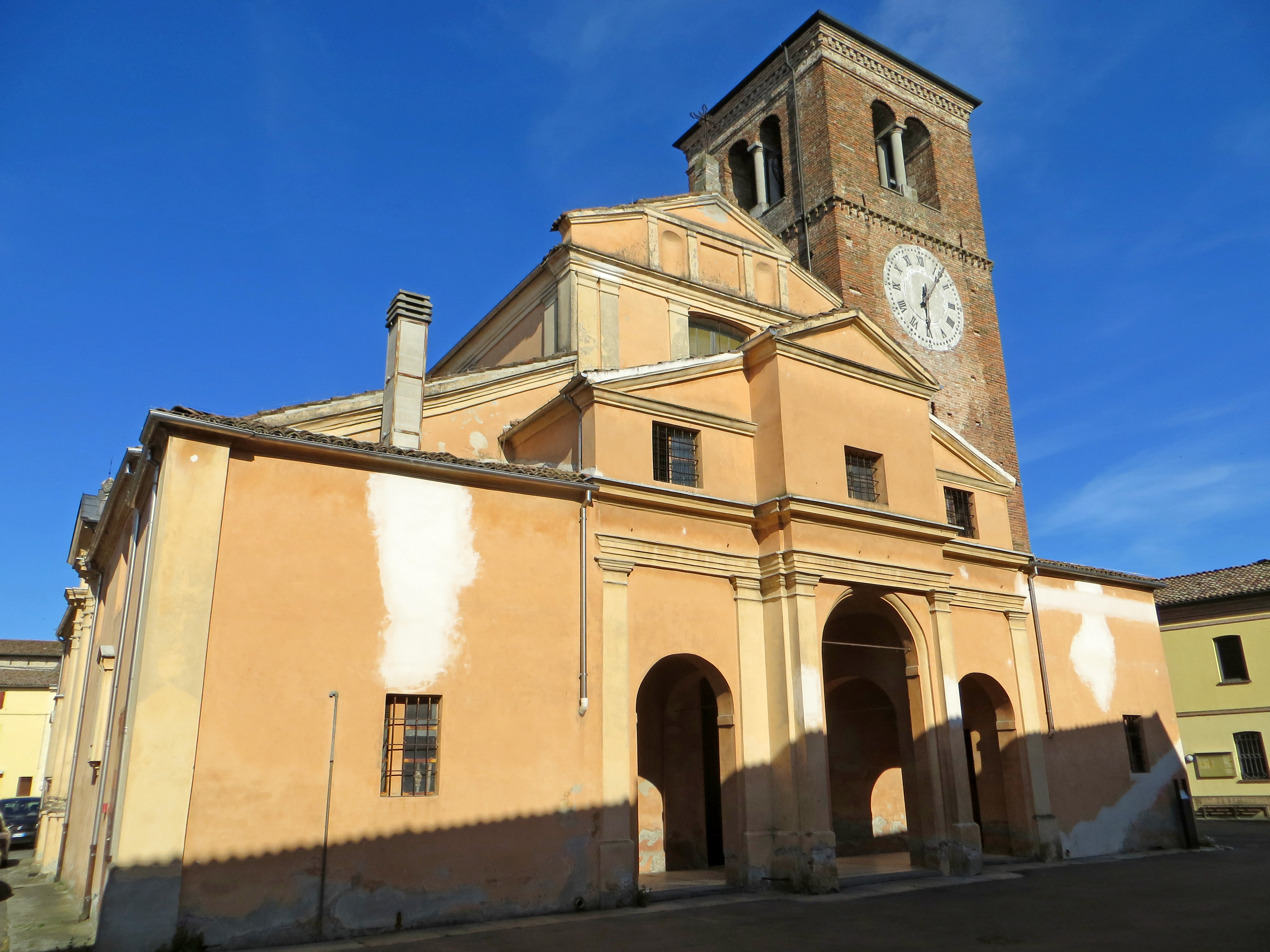 Chiesa di Santa Maria Assunta (Sissa) - facciata